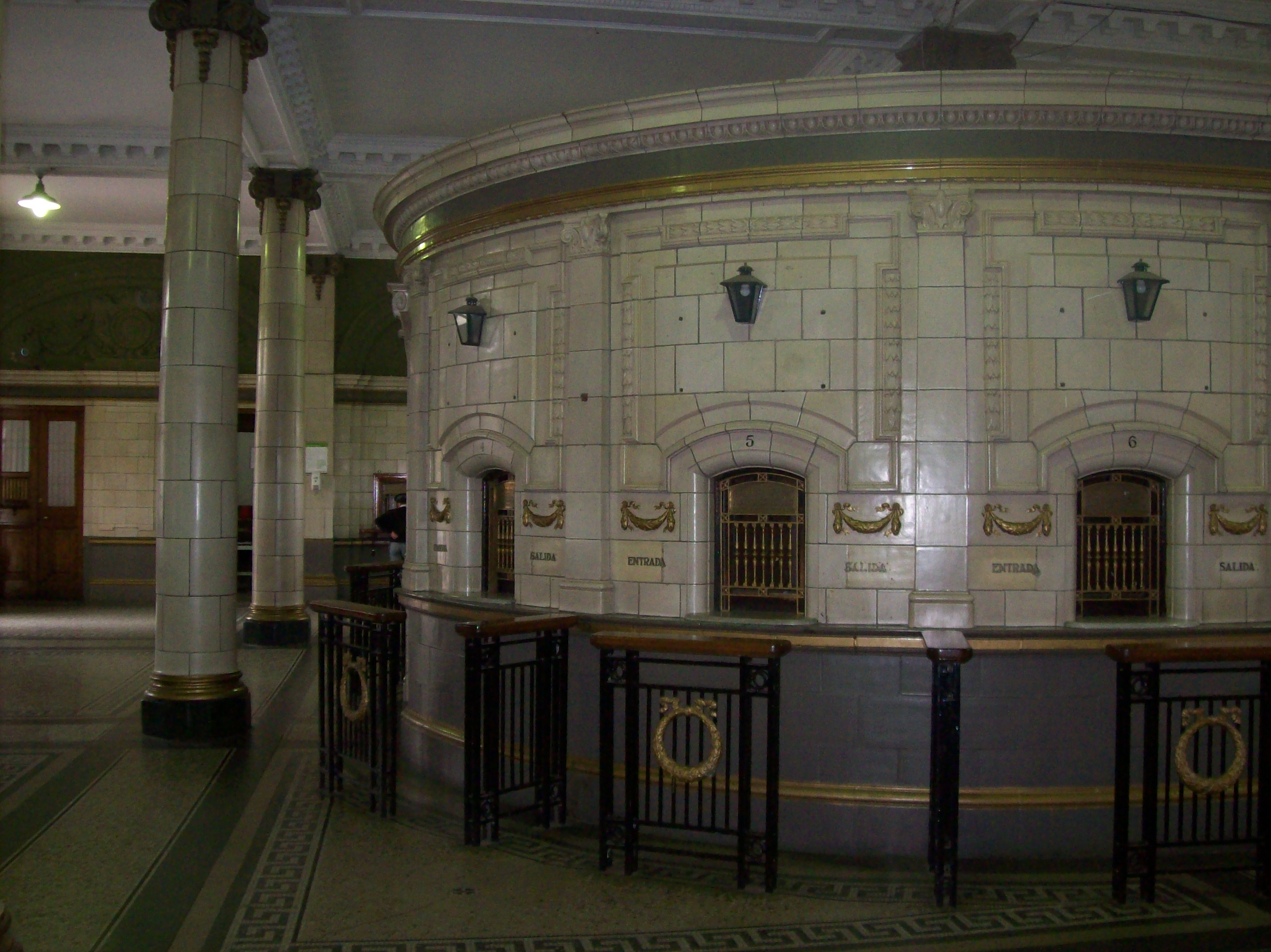 Boletería de la Estación Córdoba del FCGBM, provincia de Córdoba, Argentina.